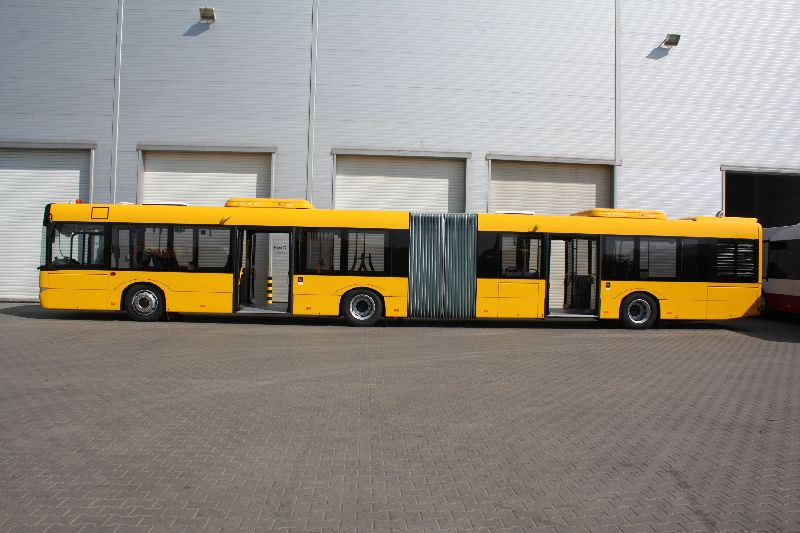 Airport